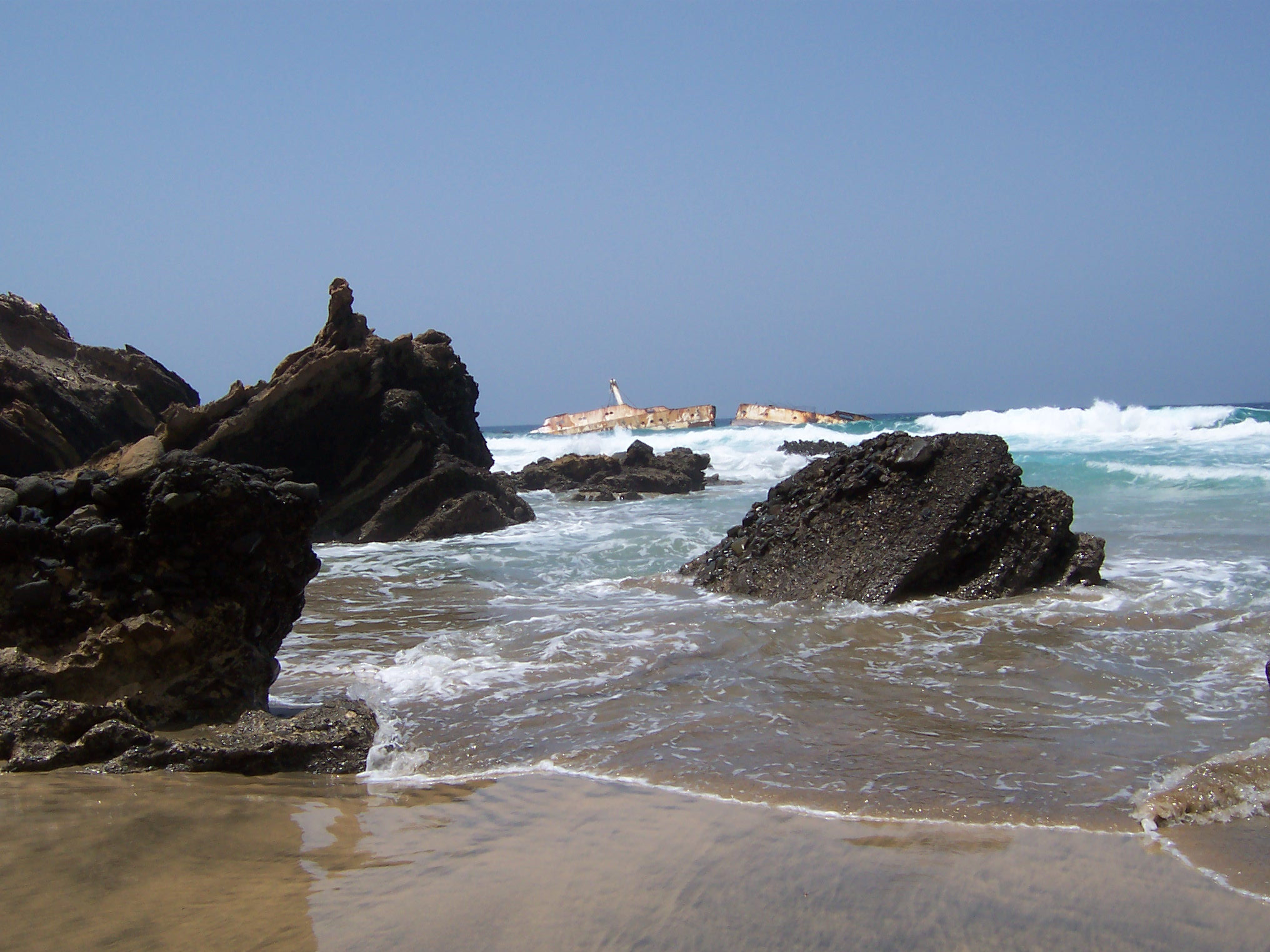 Das Wrack der SS America am 09. August 2007